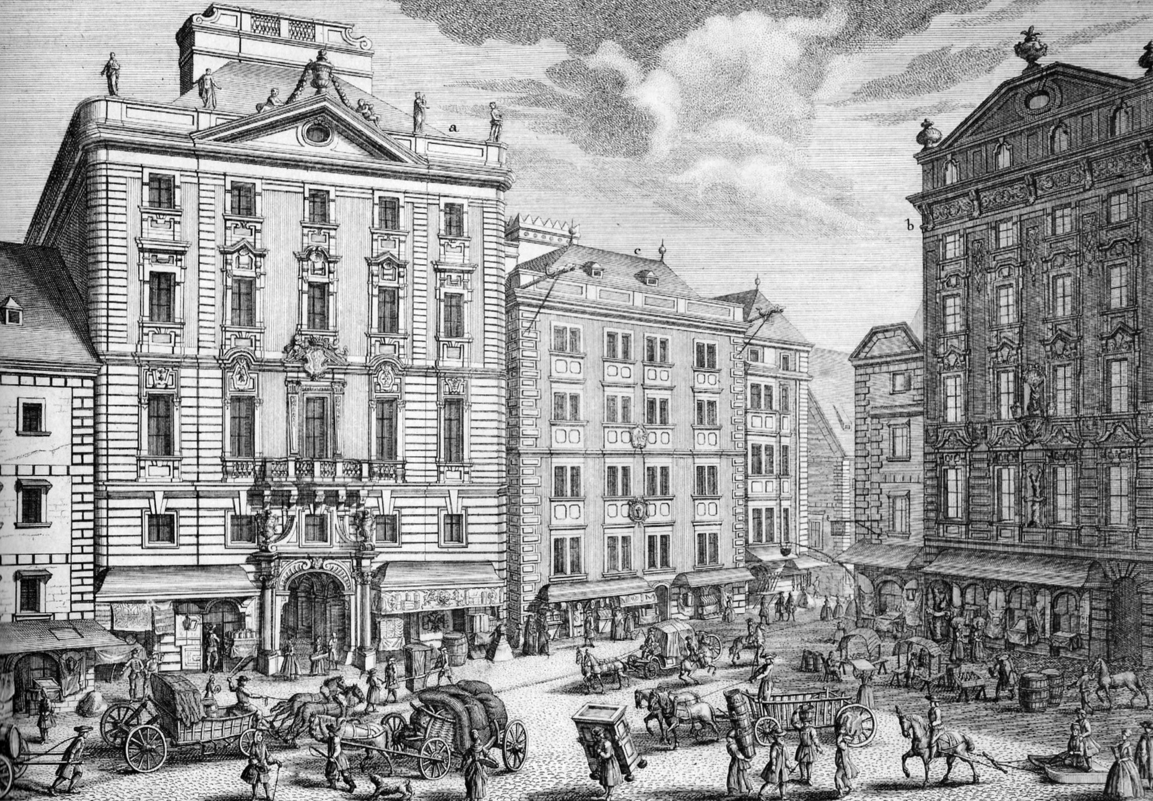 Das Schmidlinsche Haus in der Wiener Innenstadt